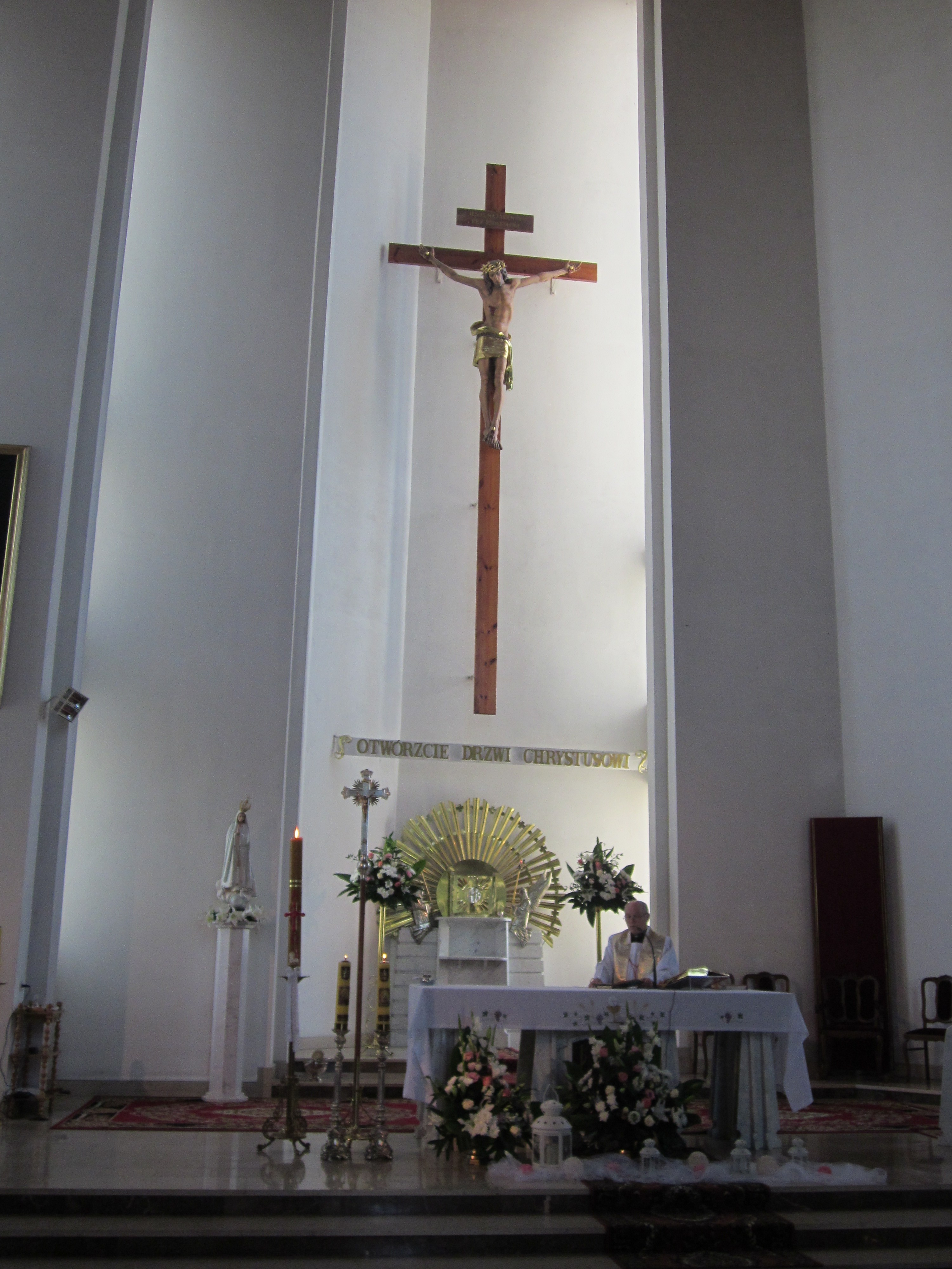 Boguty-Pianki, kościół pw. Wszystkich Świętych, Dekanat Czyżew